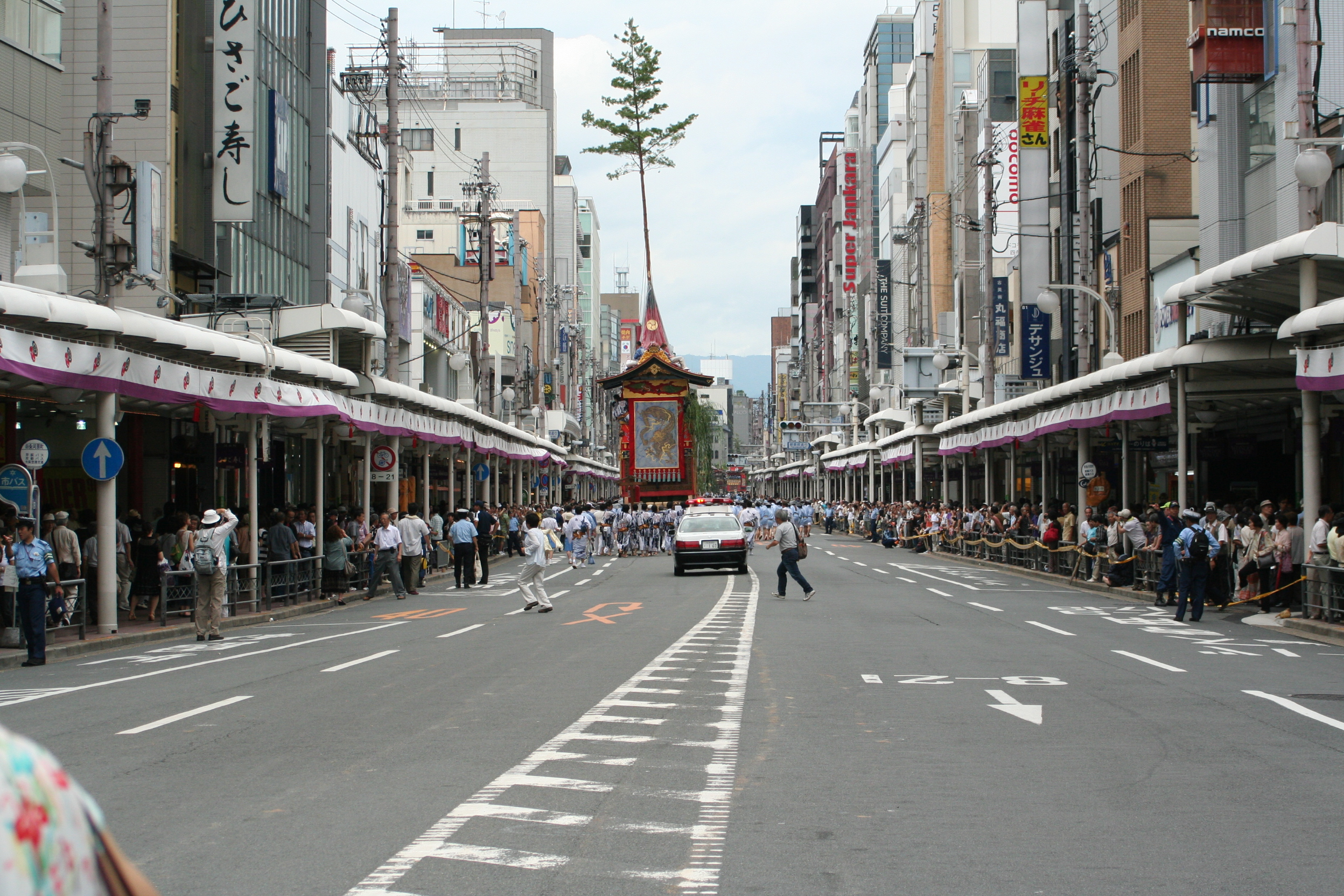 2009年7月17日に京都市で行なわれた祇園祭山鉾巡行の様子。